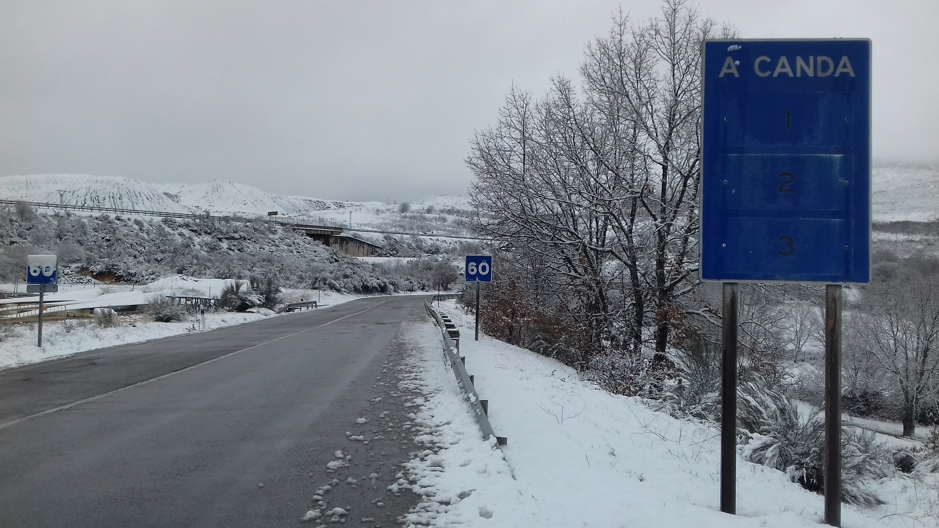 Sinal indicando a Portela da Canda na estrada N-525